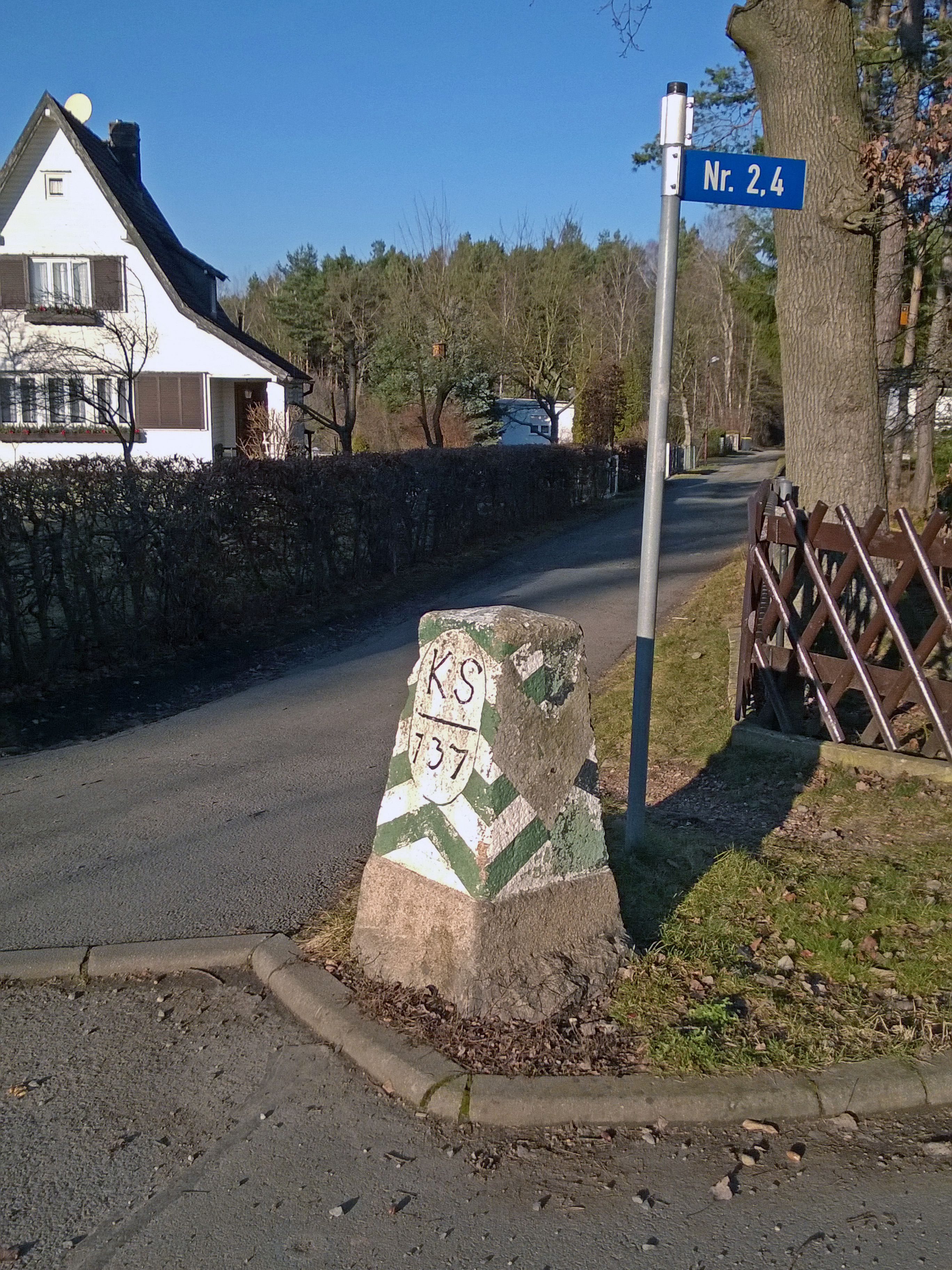 Grenzstein Nr. 137 - historische Landesgrenze Königreich Sachsen Königreich Preußen 1815 (Wiener Kongress)